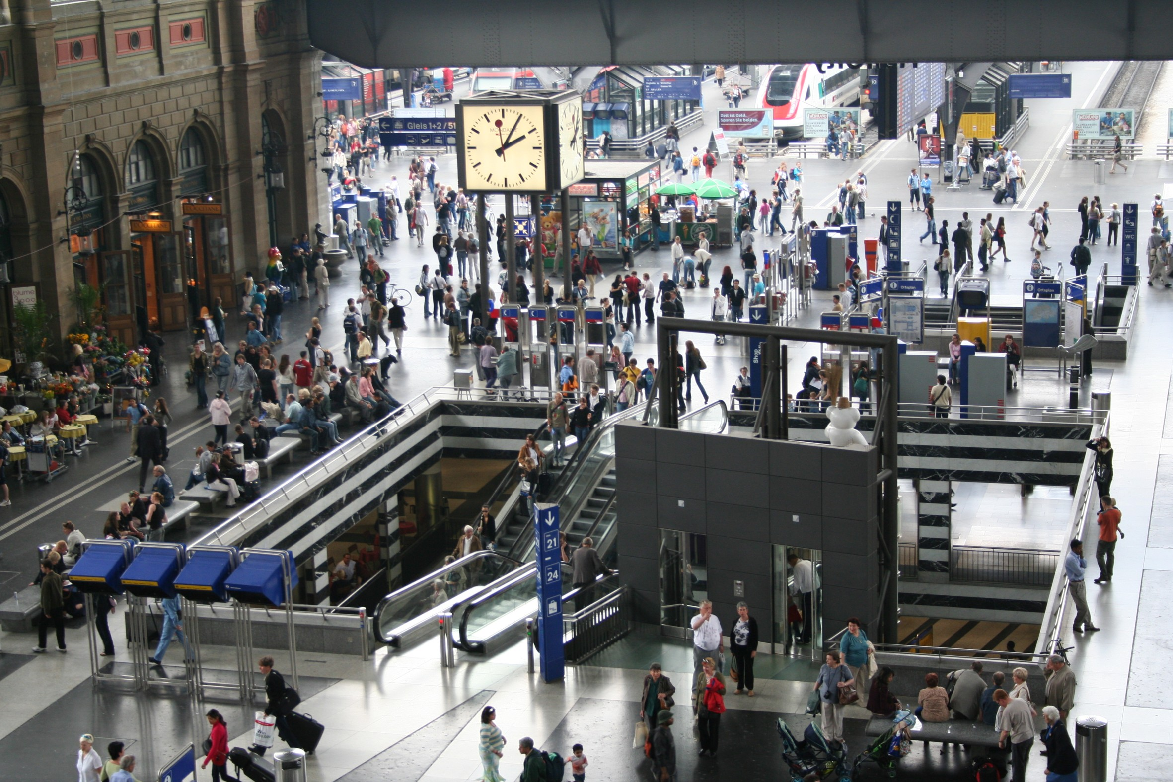 Bahnhofshalle des Zürcher Hauptbahnhofs, Schweiz